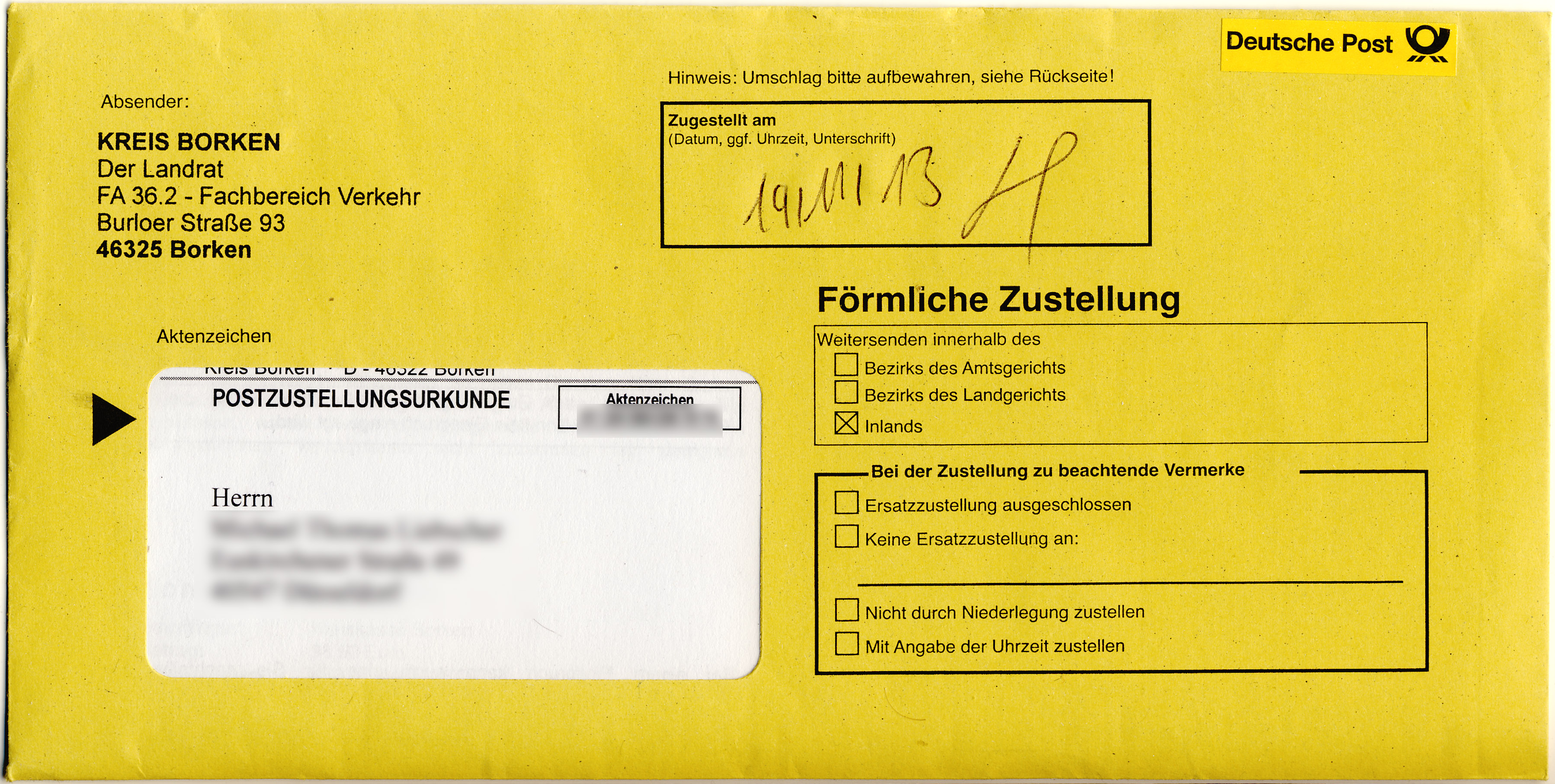 Umschlag einer förmlichen Zustellung mit Zustellungsurkunde, in dem sich ein zuzustellendes Dokument/Schriftstück befindet (hier: Bußgeldbescheid wegen einer Verkehrsordnungswidrigkeit)